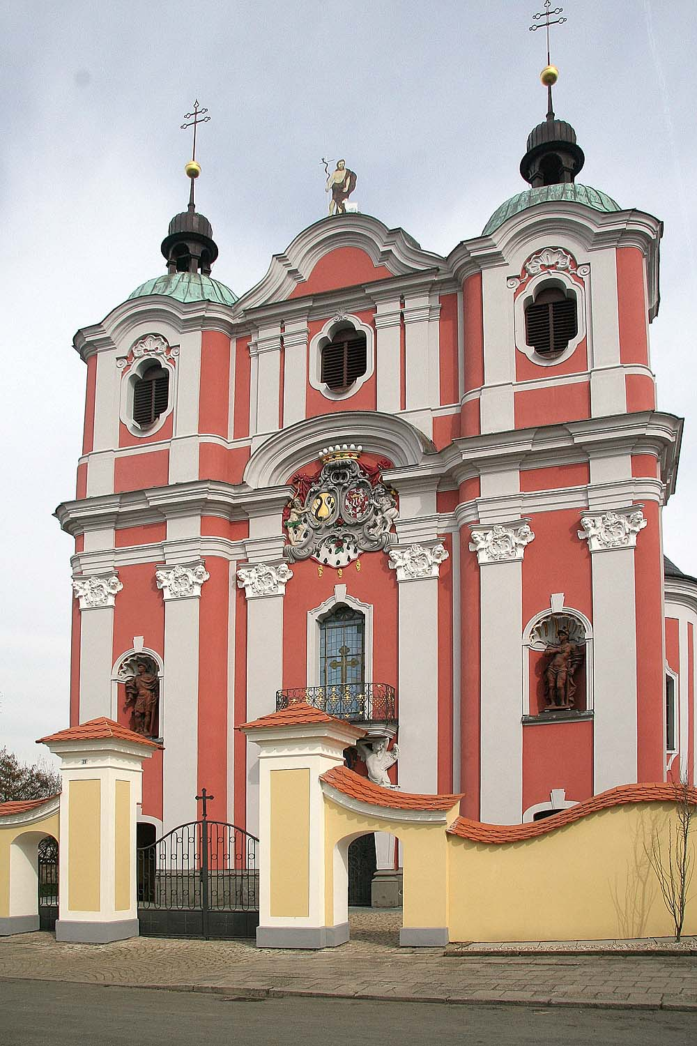 barokní kostel svatého Jana Křtitele v obci Velké Hoštice, district Opava, Czech Republic